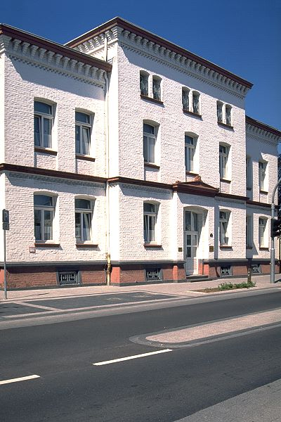 Königlich Preußisches Amtsgericht (1879–1918) in Erkelenz